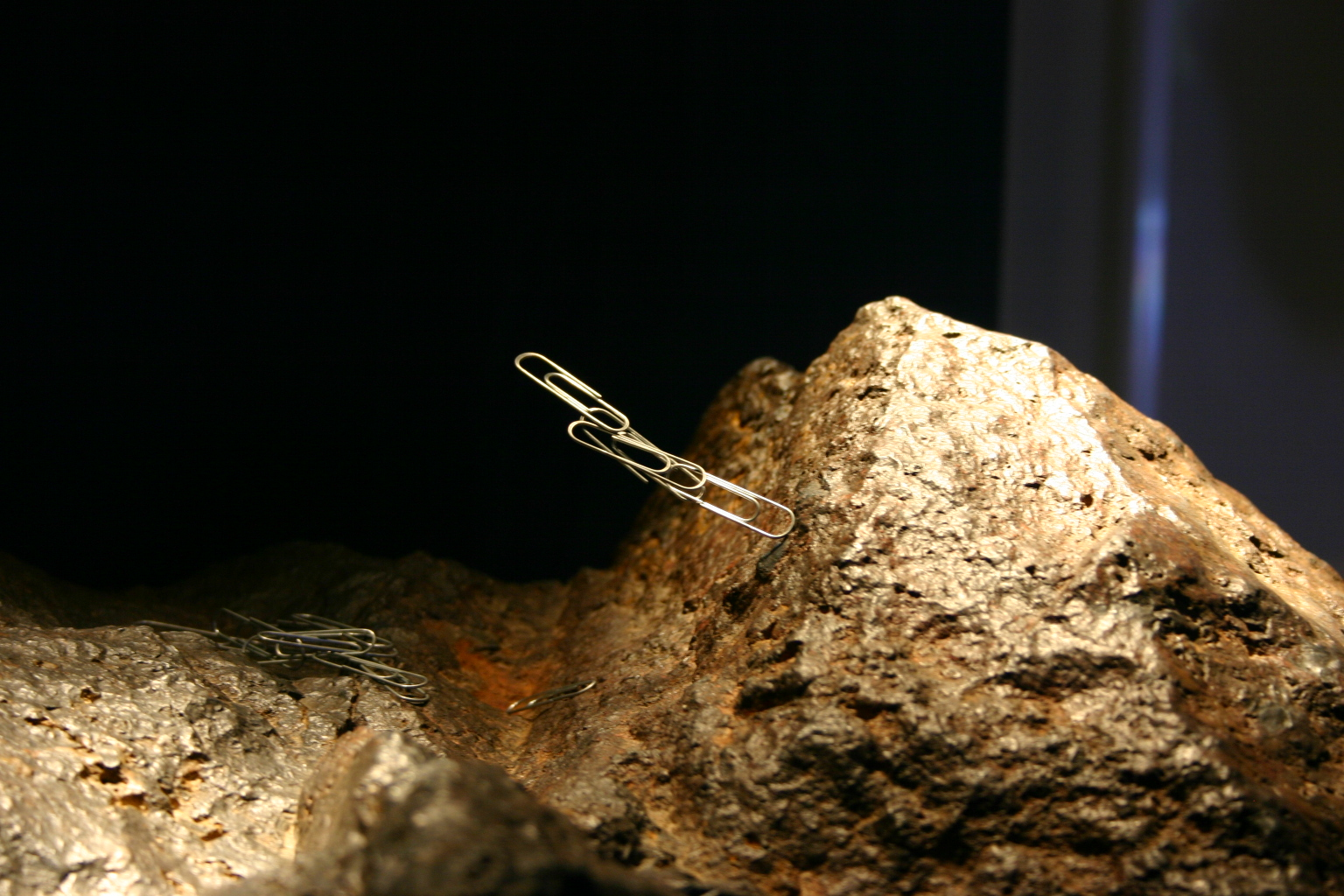 Visit my blog at